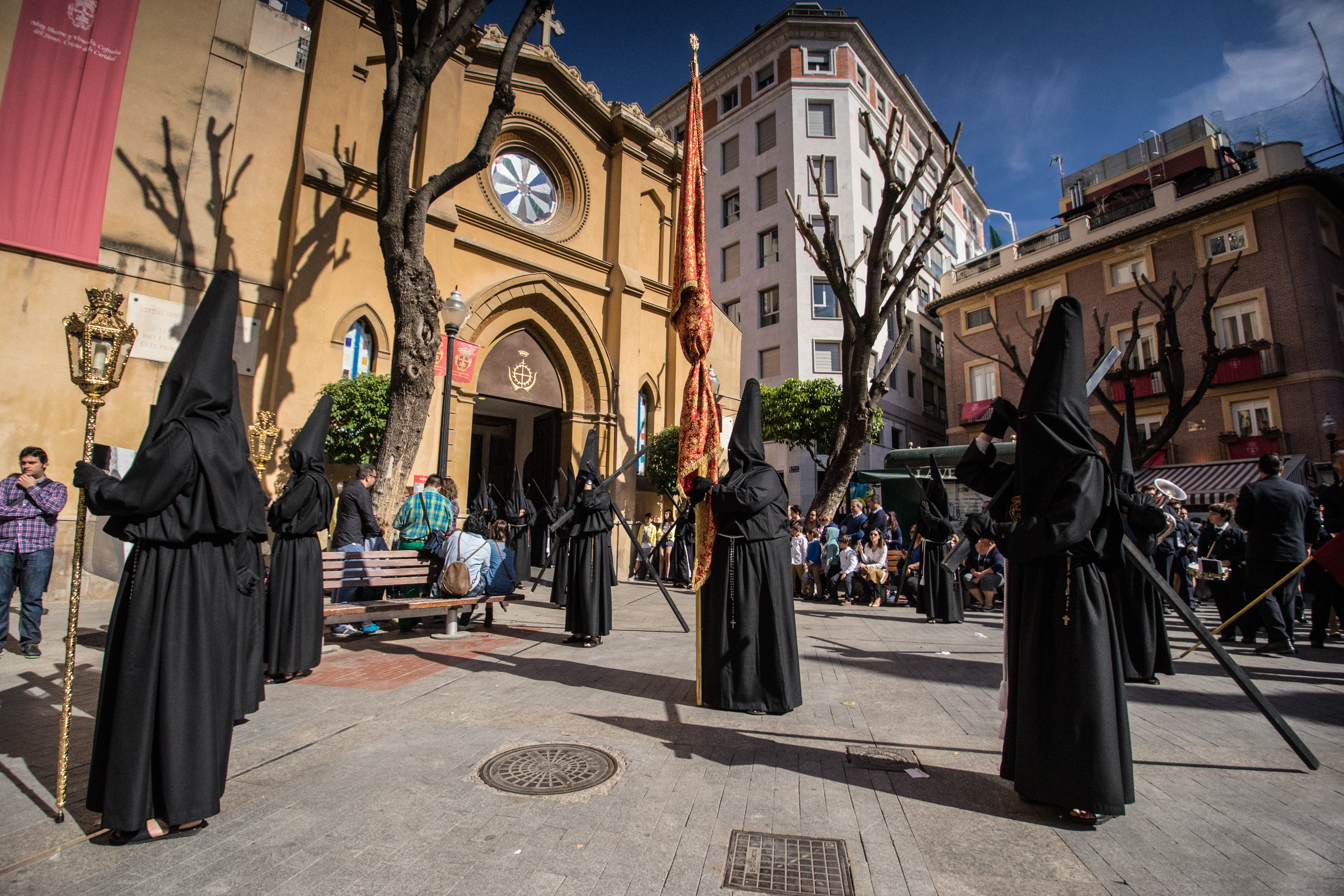 Cofradía de la Caridad. Procesión del Rosario. Salida de Santa Catalina. This is a photography of a Folklore festival in Spain (Wikidata id Q5685566).